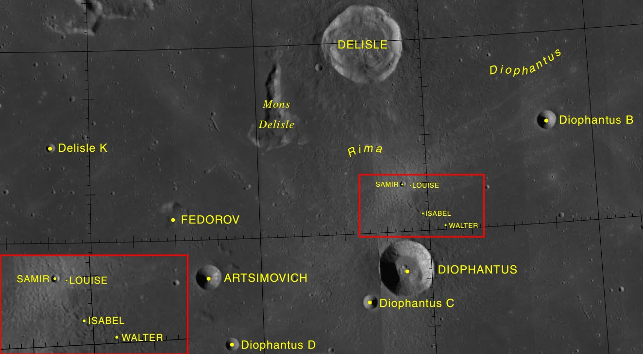 Cráteres lunares Louise, Samir, Isable y Walter junto a Diophantus